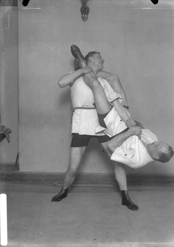 Jiu-Jitsu, die moderne Verteidigungswaffe bei Überfällen! demonstriert von dem deutschen Jiu-Jitsu-Meister Erich Rahn. Das Parieren eines Angriffes. Der deutsche Jiu-Jitsu-Meister Erich Rahn umklammert mit den Beinen den Hals des angreifenden Gegners. Diese Art wird angewandt, einen ganz gefährlichen Gegner unschädlich zu machen.